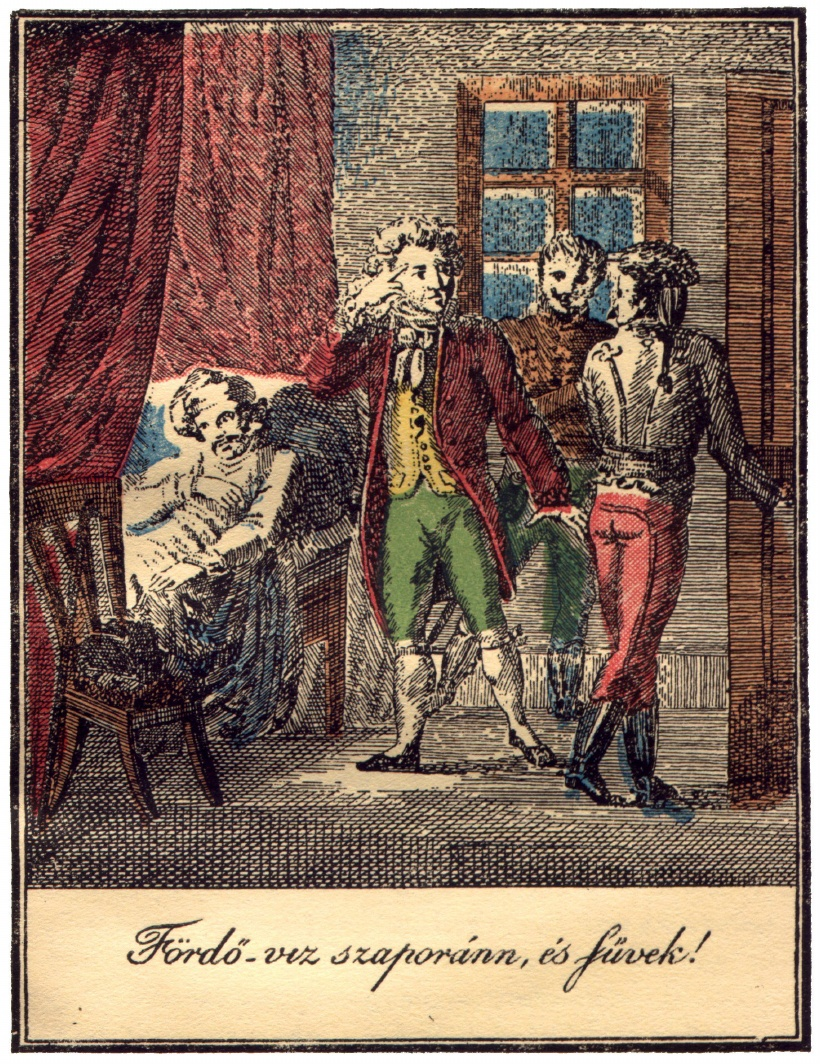 A Lúdas Matyi 1817-es bécsi kiadásából Göbwart F. S. egykorú, színes illusztrációja: Lúdas Matyi német doktorként